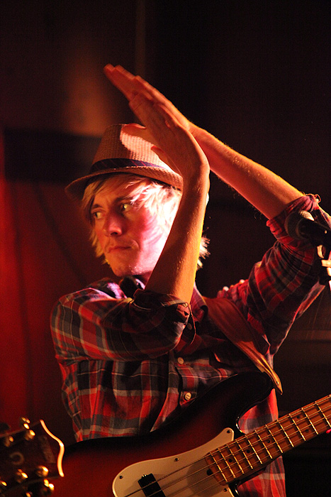 Knut Olav Sandvik i Ni Liv 2010 Foto: Eskil Olsen